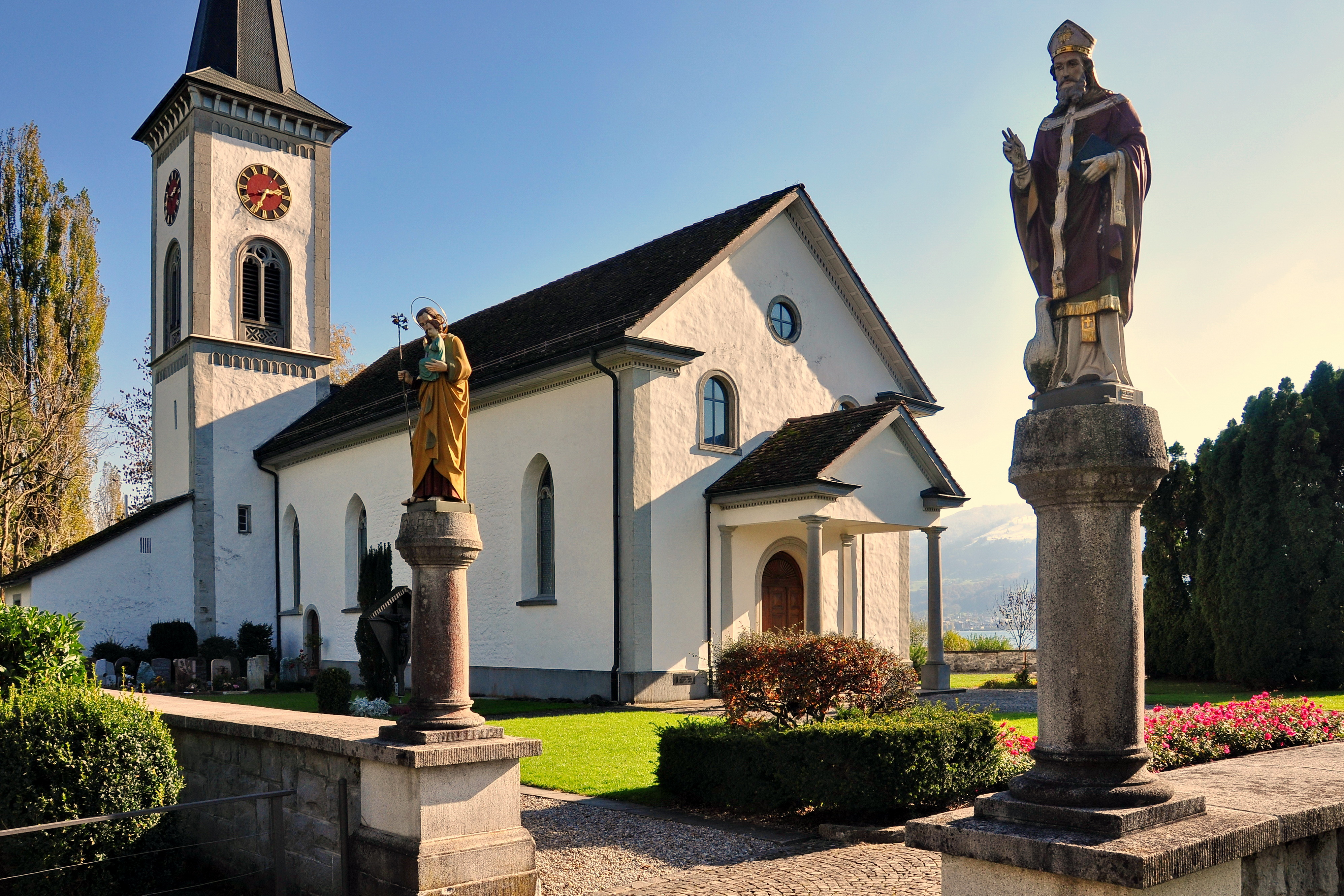 Busskirch in Jona (Switzerland) on Obersee (upper Lake Zürich) shore